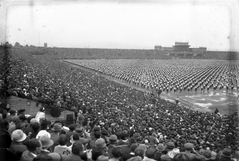 Das grösste Turnfest der Welt ! Das Sokolfest in Prag. Alle 5 bis 6 Jahre treffen sich die in dem Sokol-Verband zusammengeschlossenen Frauen und Männer zu einem Turnfest, bei welchem mitunter 30 bis 40 000 Teilnehmer zusammenkommen. Blick in das Prager Stadion während der Massenfreiübungen der Sokols.